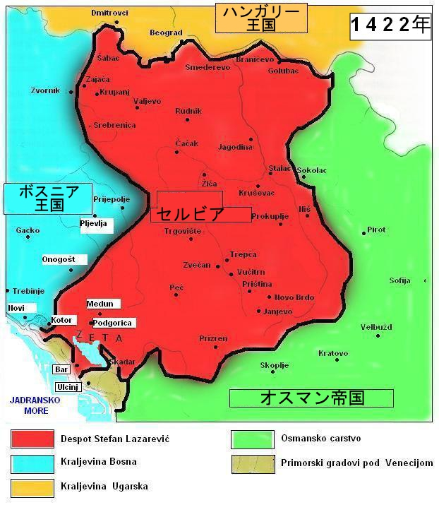 Српска деспотовина 1422. године